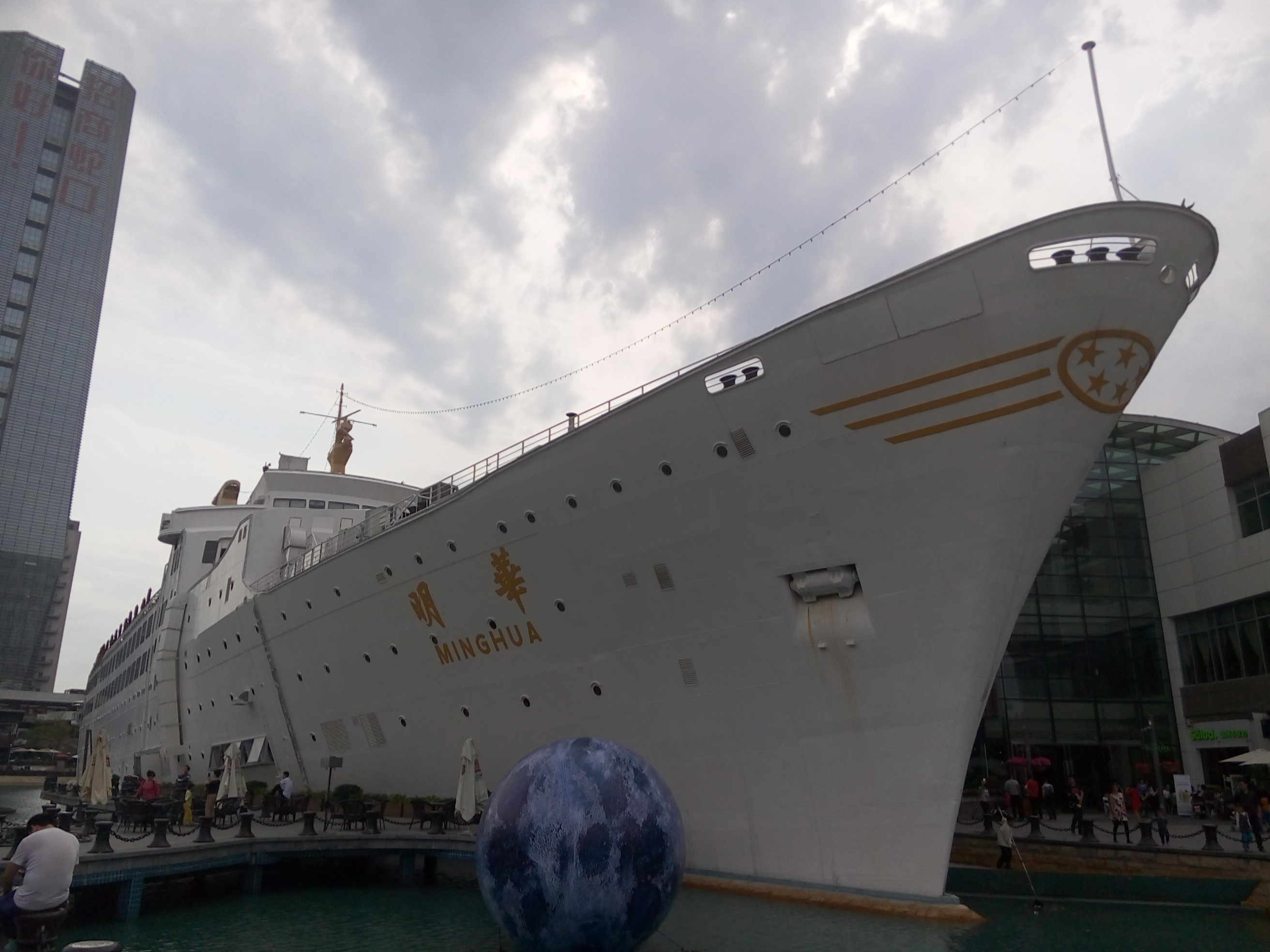 Shekou Shenzhen China